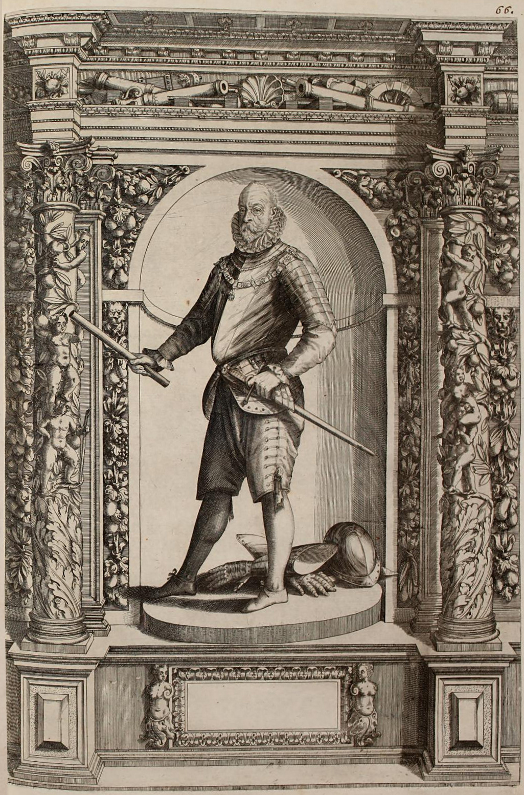 Porträt Peter Ernsts I. von Mansfeld